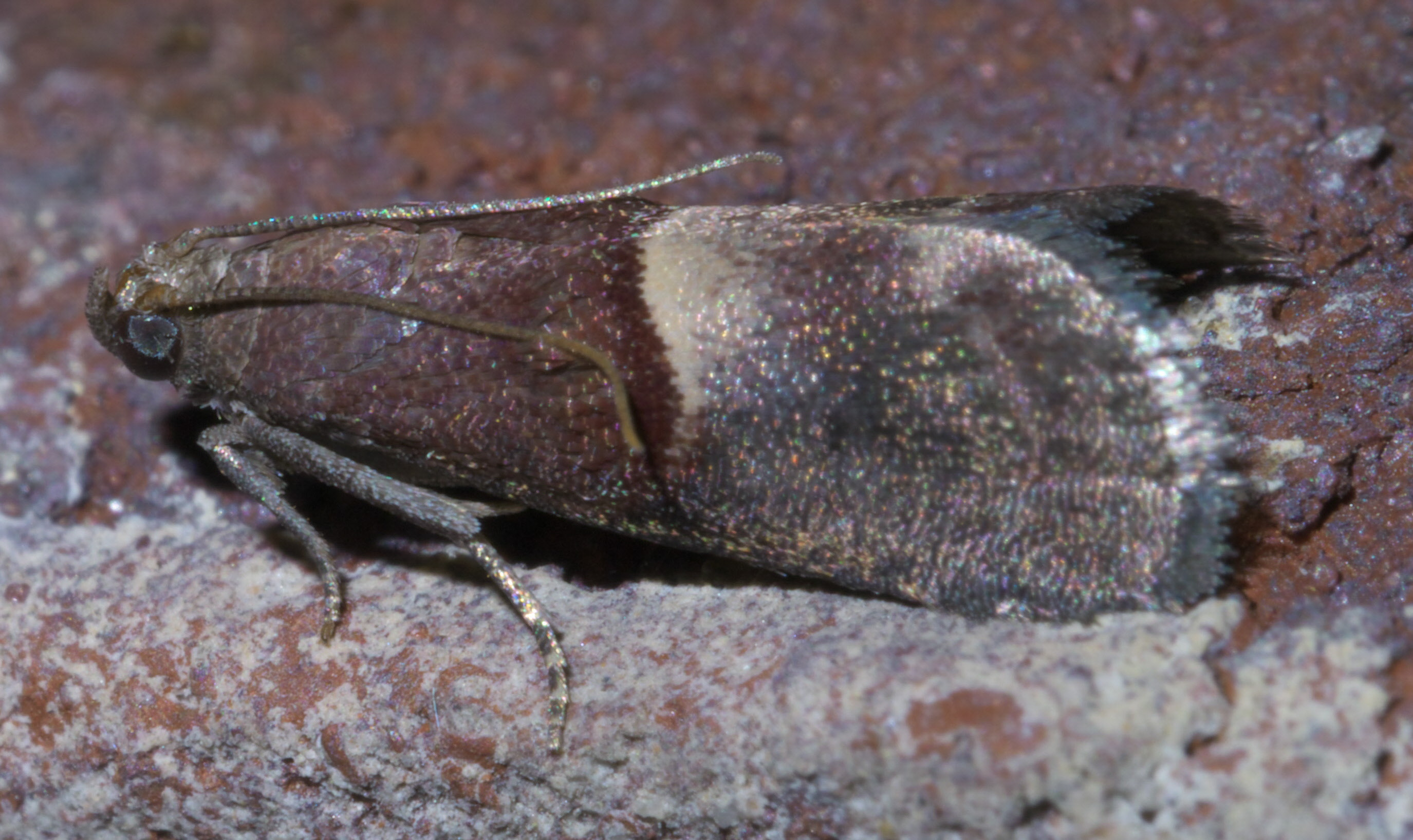 Acrobasis exsulella, cordovan pyralid, ID Confidence: 88